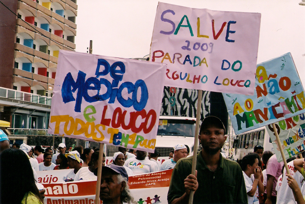 II Parada do Orgulho Louco, realizada em Salvador, Bahia - Brasil II Mad Pride Parade, Salvador, Bahia - Brazil Fuji Superia 400 Yashica FX-D | Yashica Lens 50mm